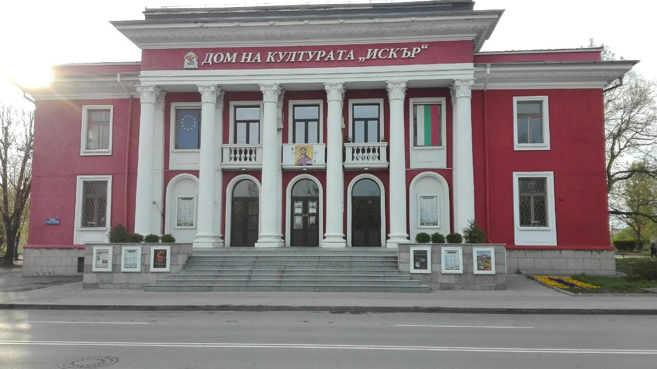 Читалище кв. Дружба, София